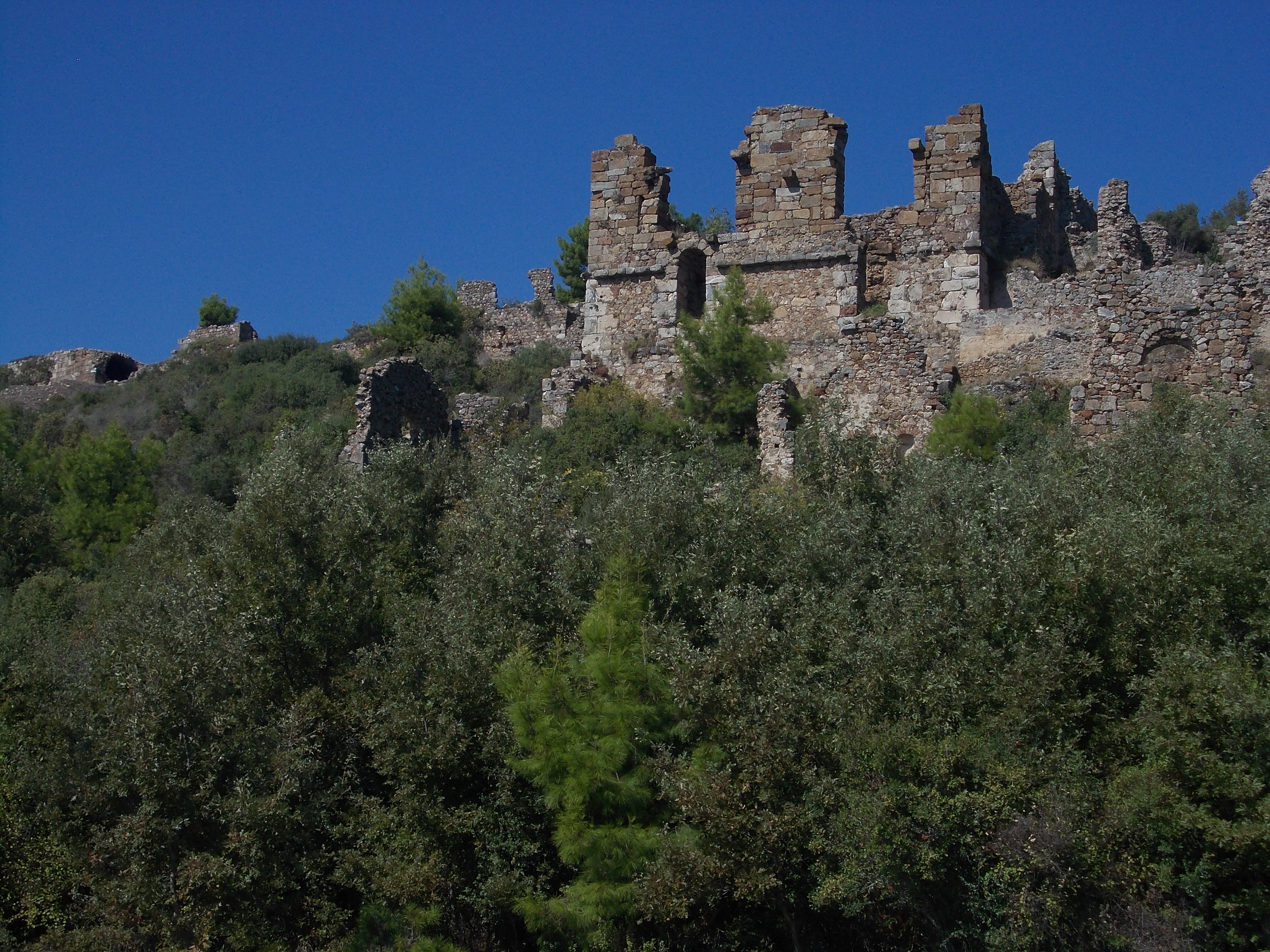 Alanya-griechisch-römisch-byzantinische Ruinenstadt unter - Syedra-Ostteil